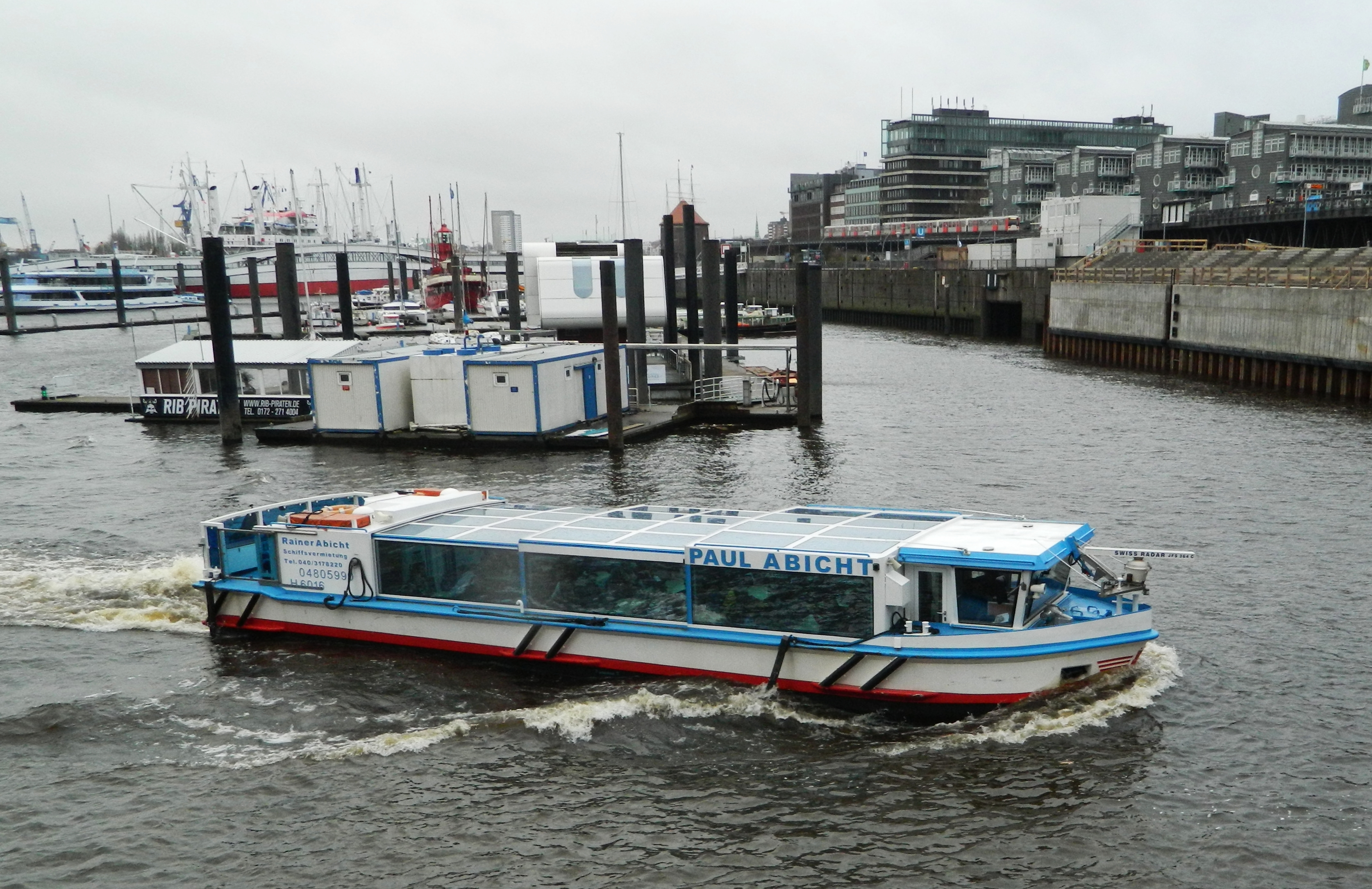 Paul Abicht